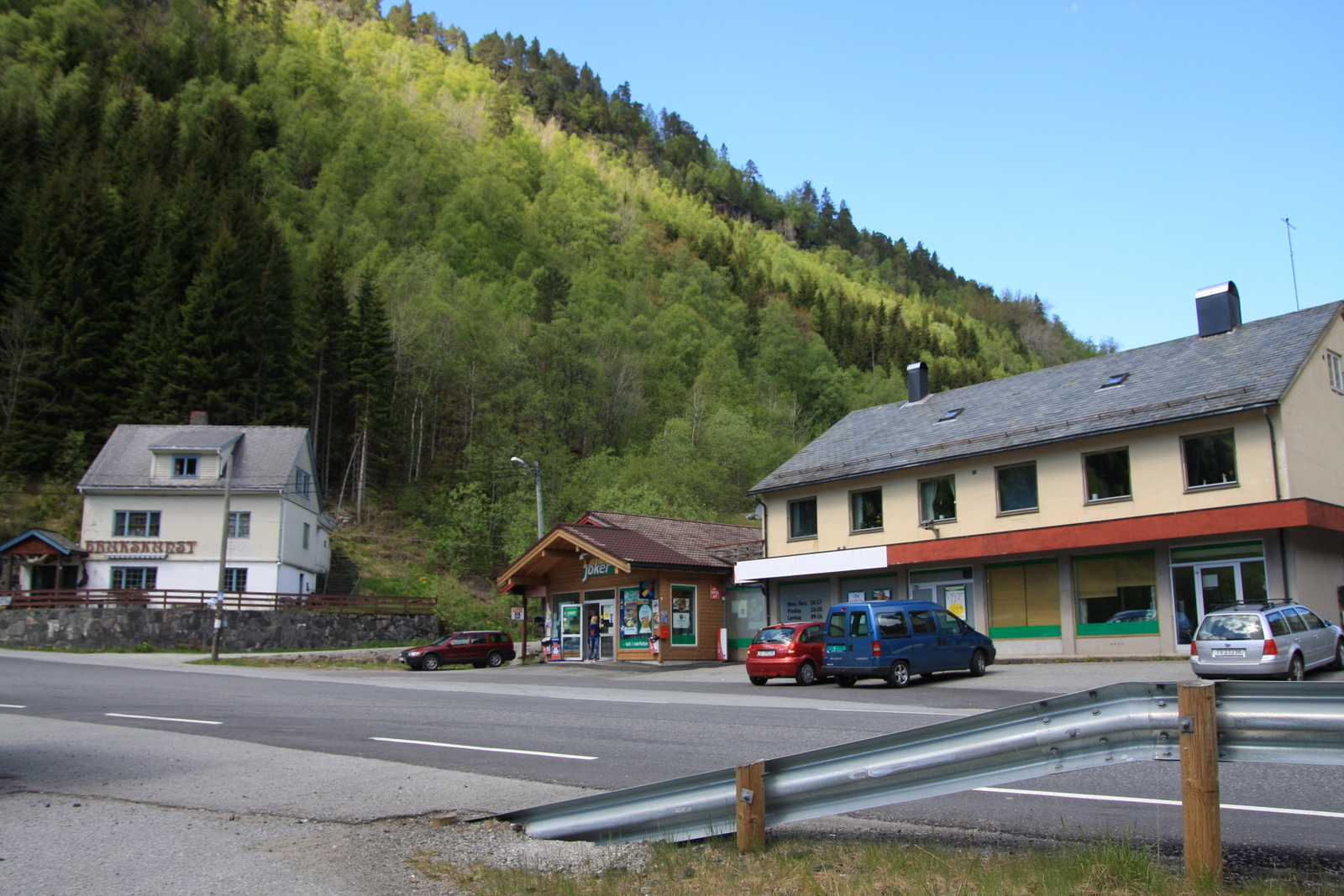 Skare